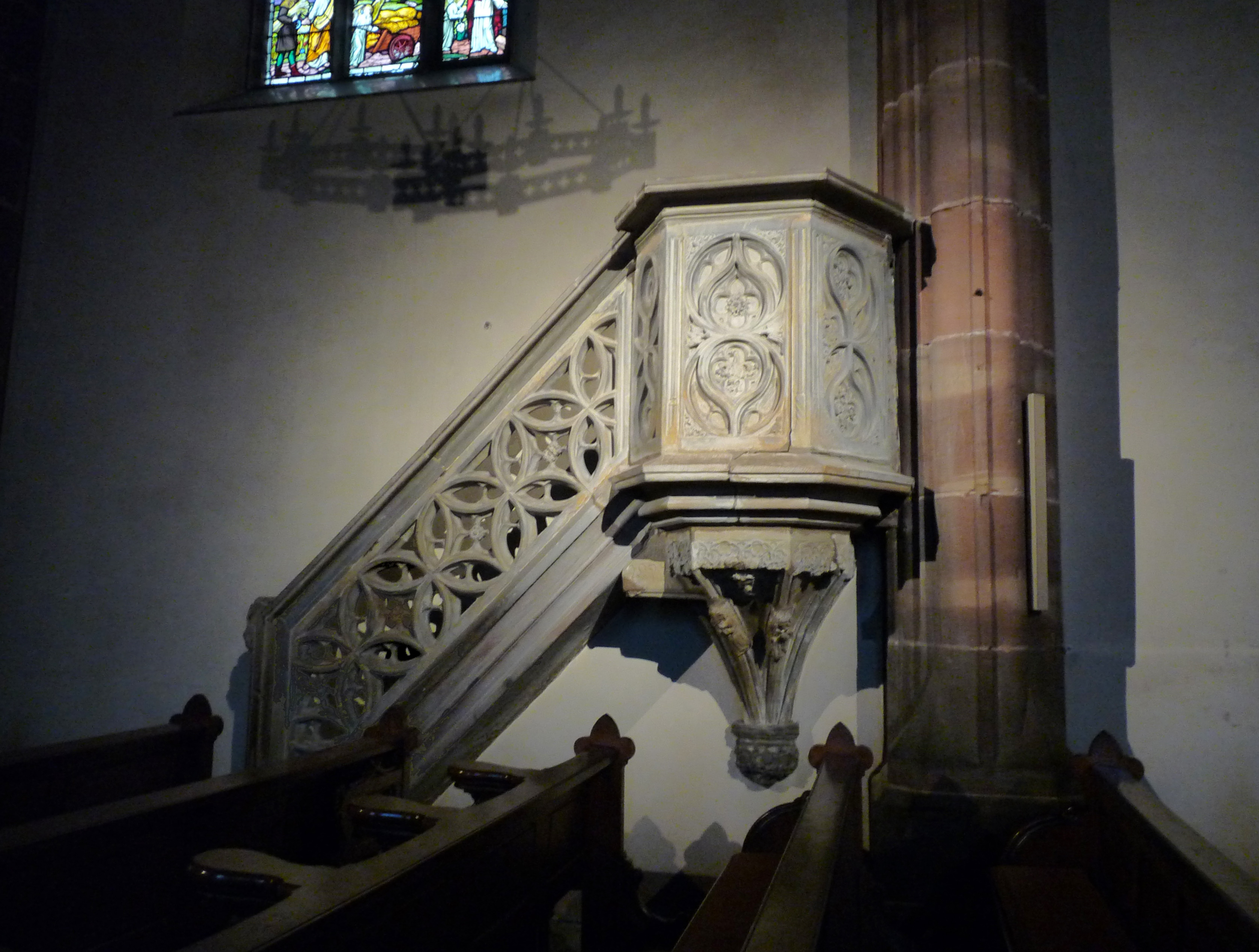 Chaire de l'église Notre-Dame de la Nativité à Saverne (Bas-Rhin)